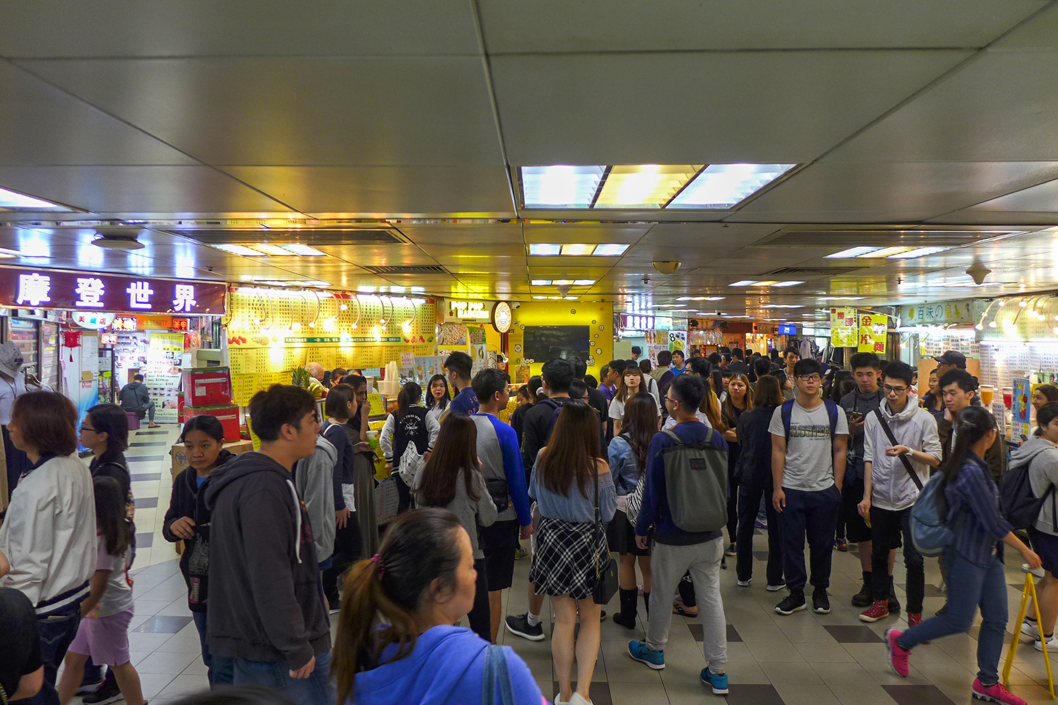 Kwai Chung Plaza Level 3